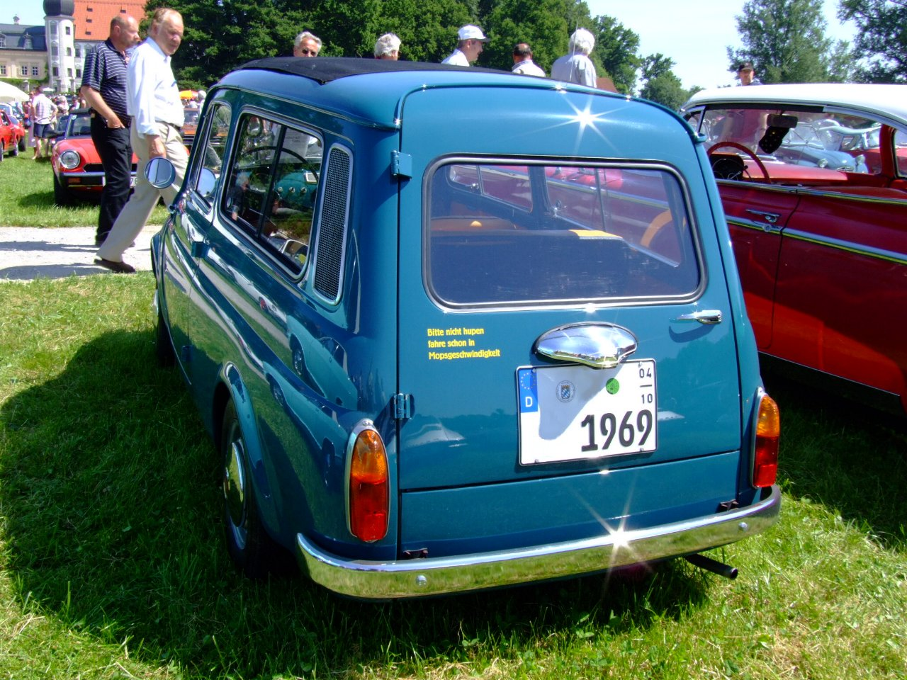 Fiat 500 Giardiniera Baujahr: 1969 17,5 PS von vorn